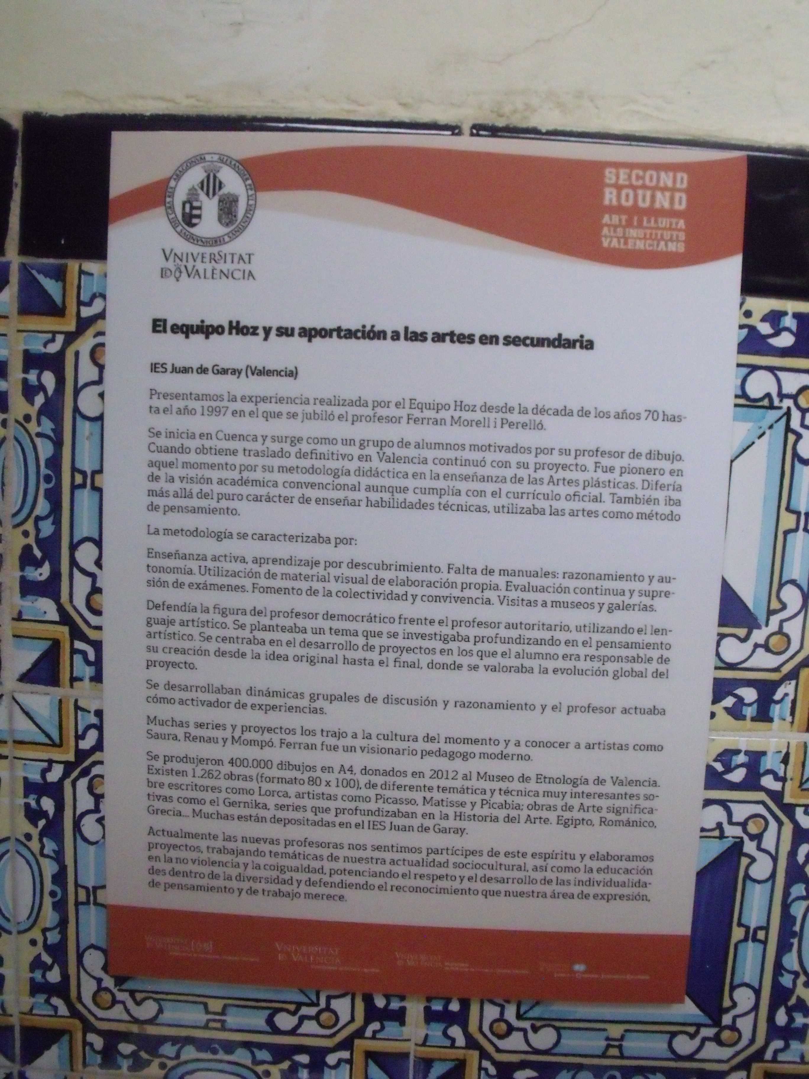 Panel informativo de la labor educativa de la experiencia pedagógica en el mundo de las artes conocida como Equipo Hoz, durante su desarrollo en el IES Juan de Garay de Valencia